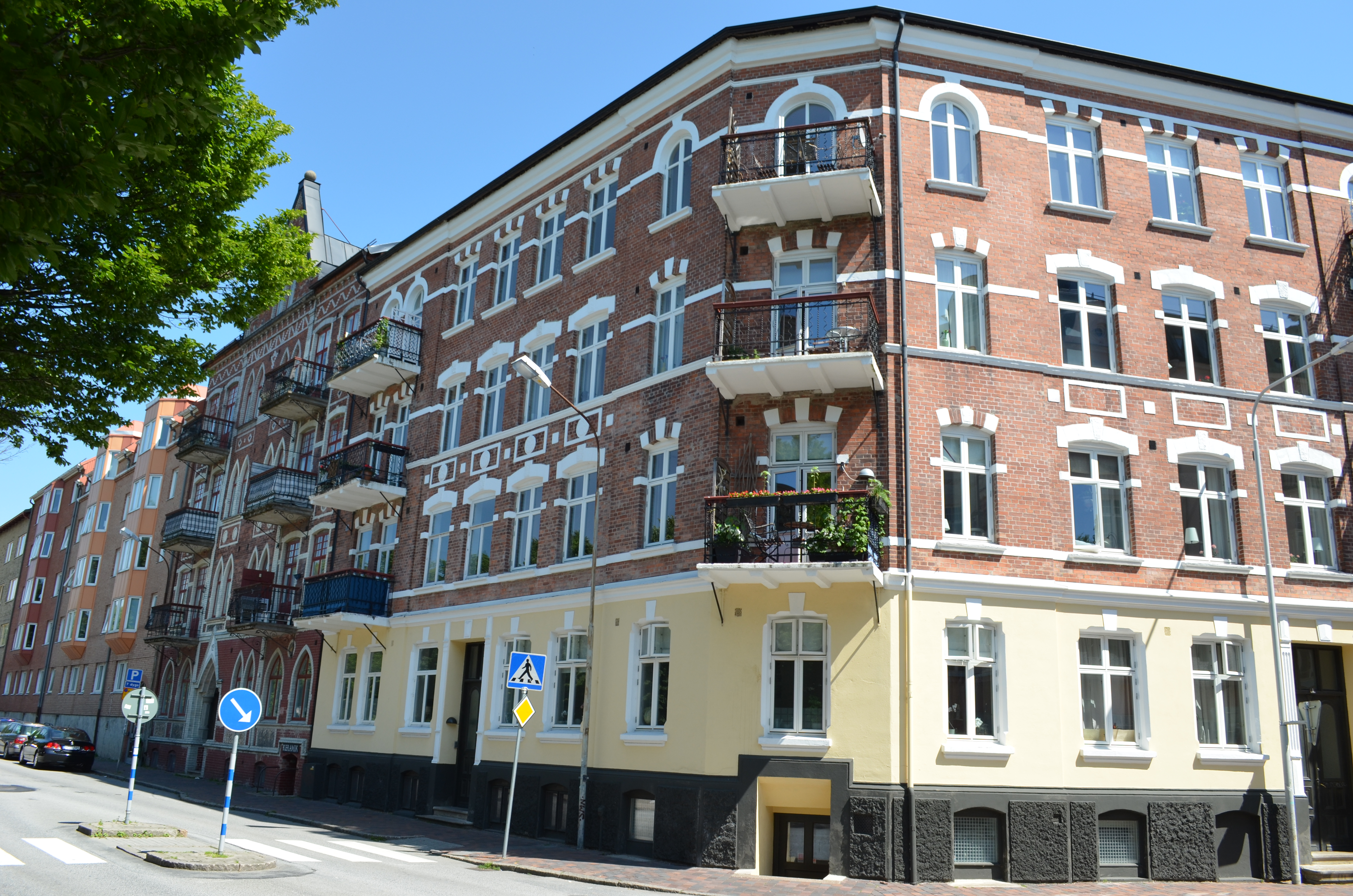 Eneborg i Helsingborg.